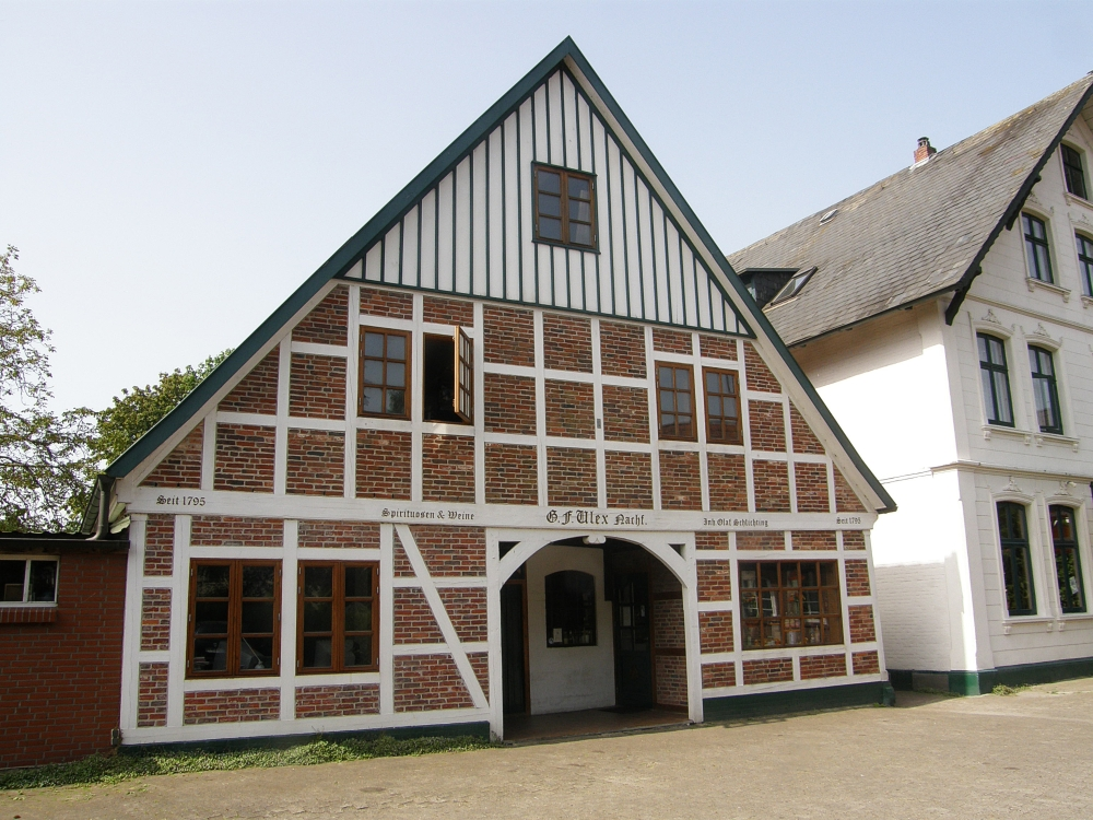 Die Spiritosengeschäft und Brennerei Ulex und das Café in Neuhaus (Oste)